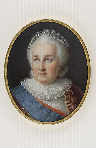 Portrait de Catherine II d'aprиs Mme Vigйe-Lebrun